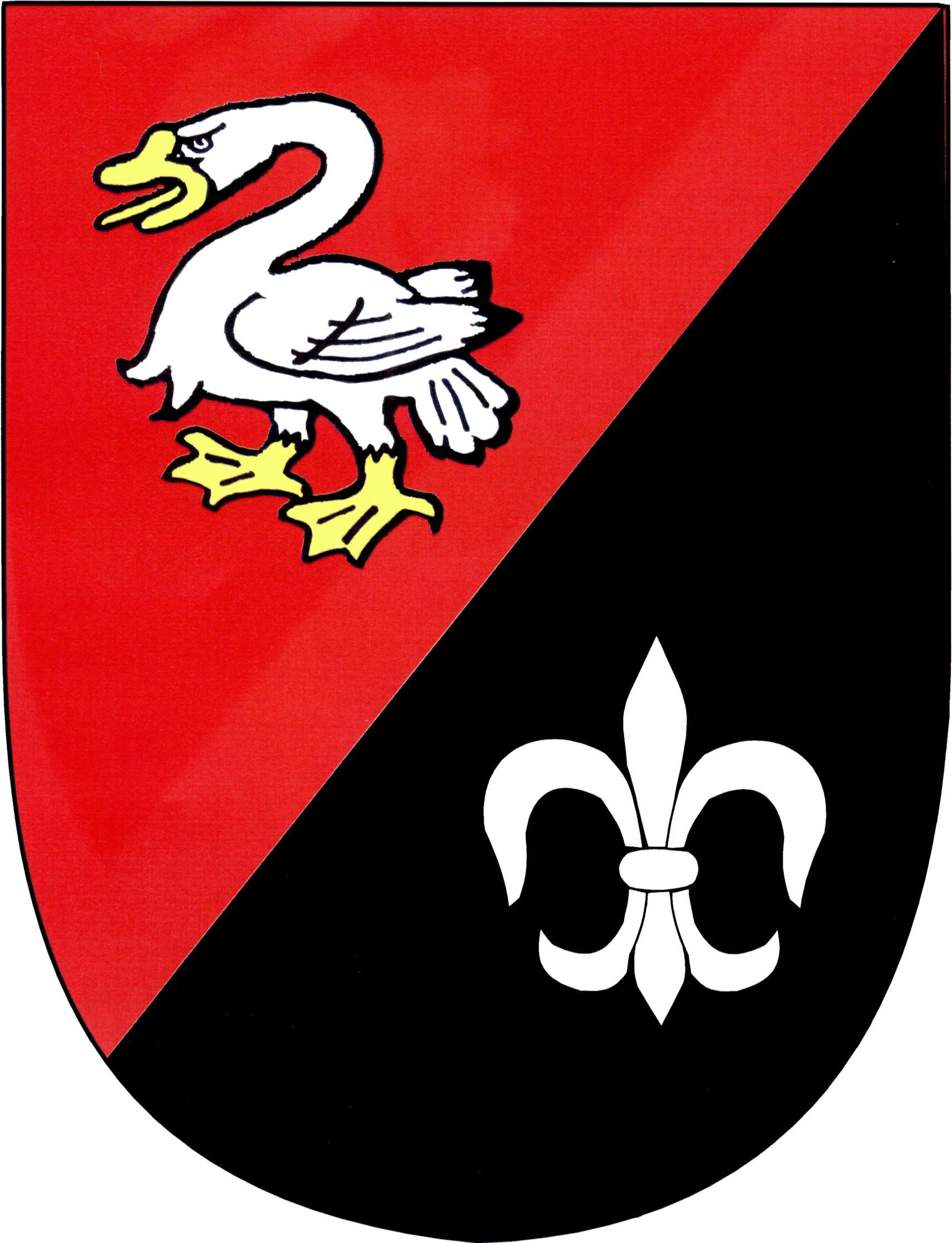 Znak obce Staré Sedlo (okres Tachov)